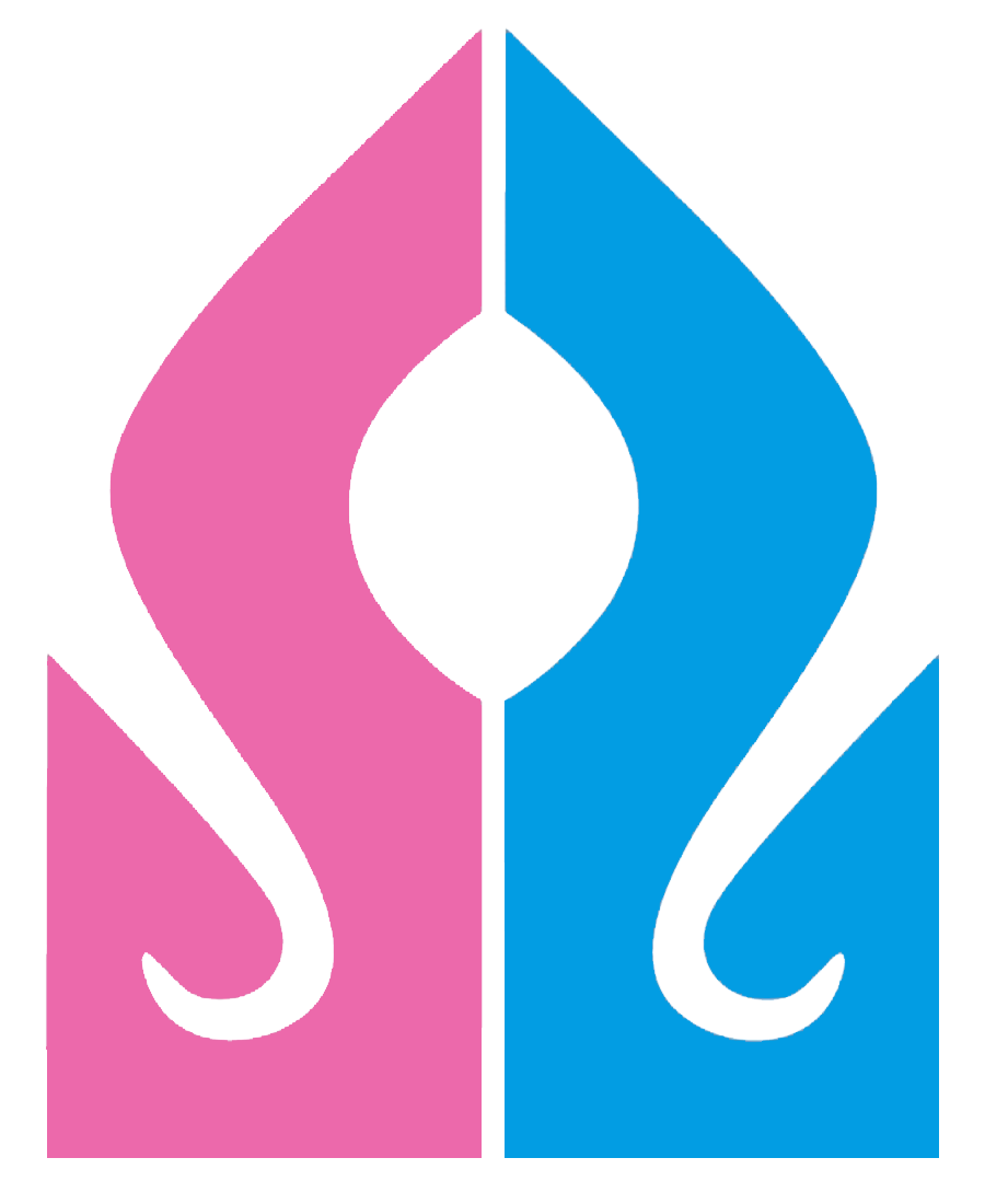 ตราเสมา ใช้เป็นสัญลักษณ์ของนักเรียนในเครือสวนกุหลาบทั้งหมด